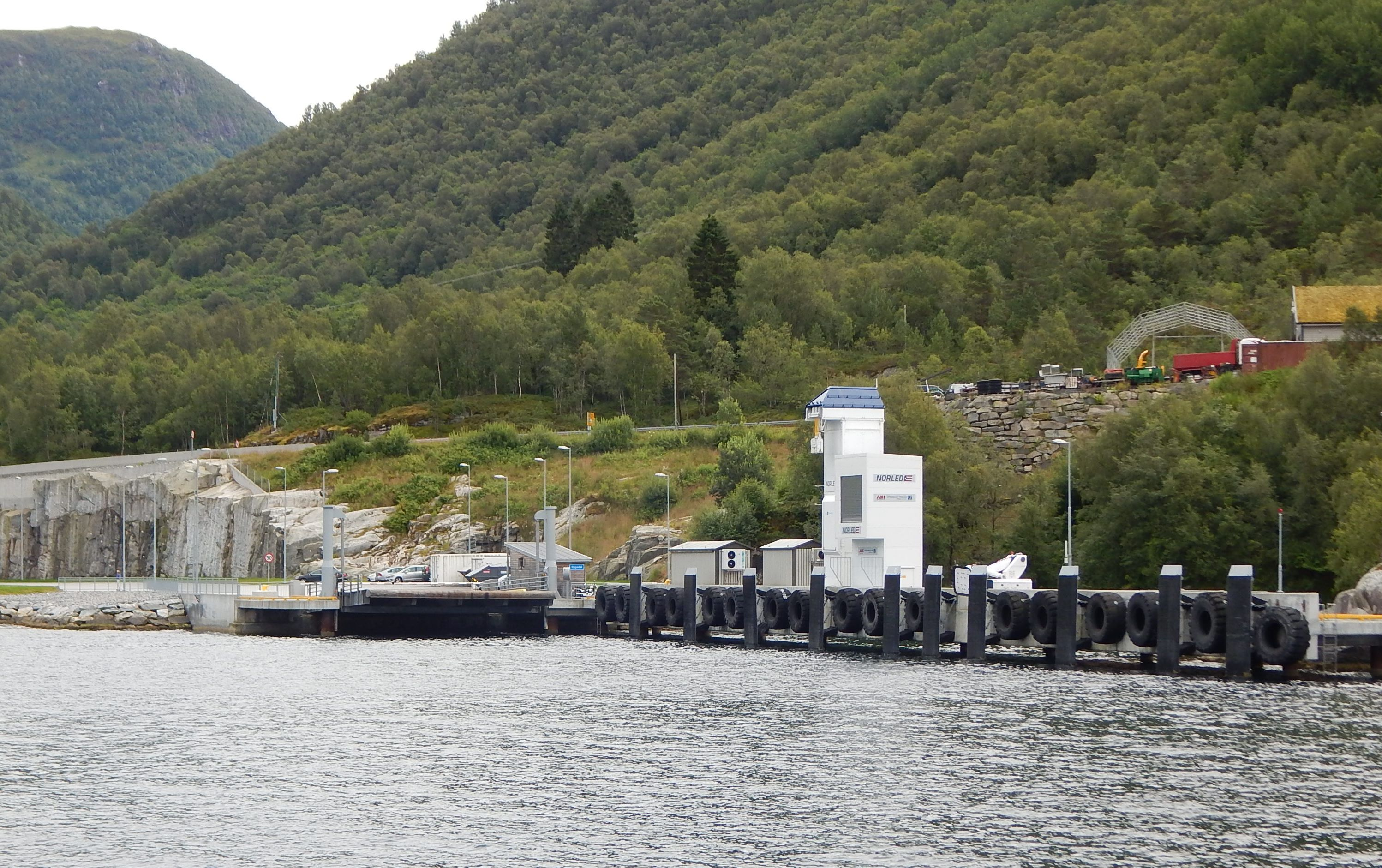 Inn mot Oppedal fergekai